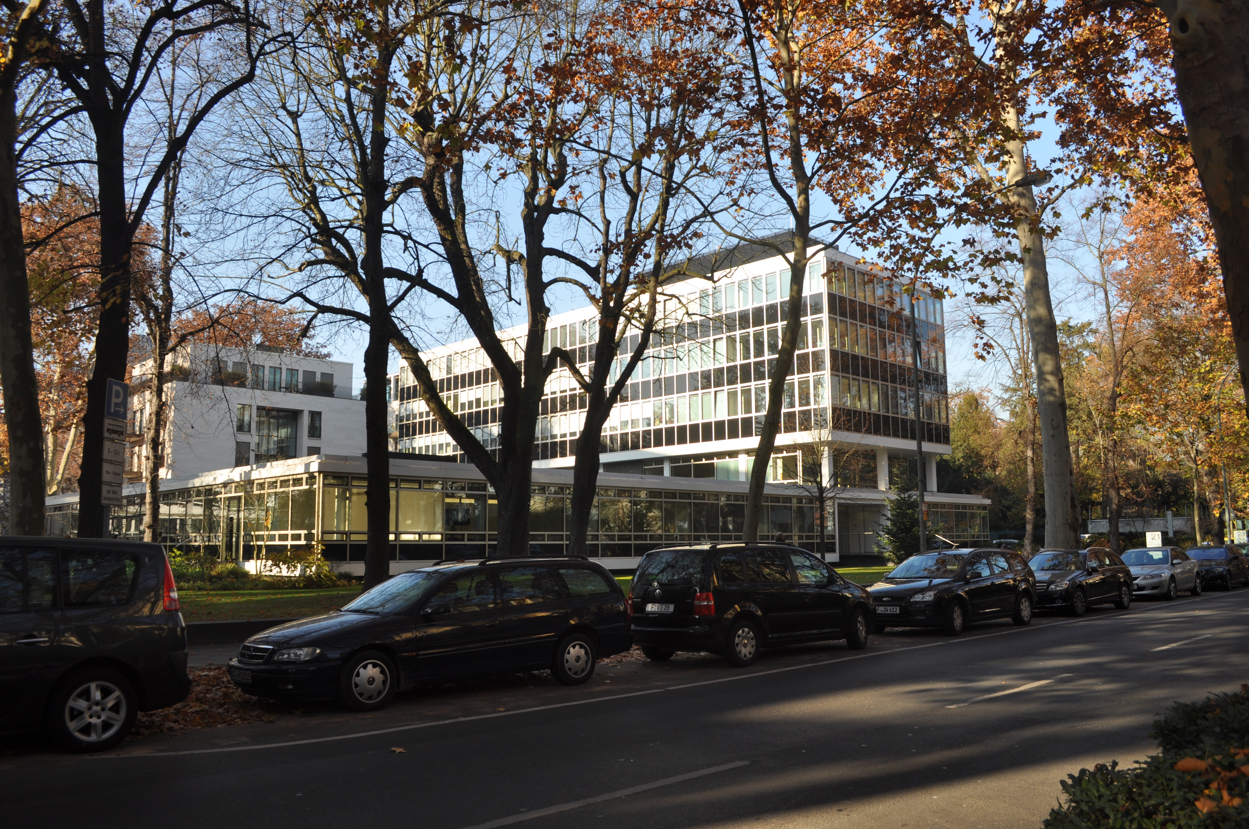 Denkmalgeschütztes Haus Siesmayerstraße 21 in Frankfurt. Es handelt sich um das ehemalige Generalkonsular der USA.